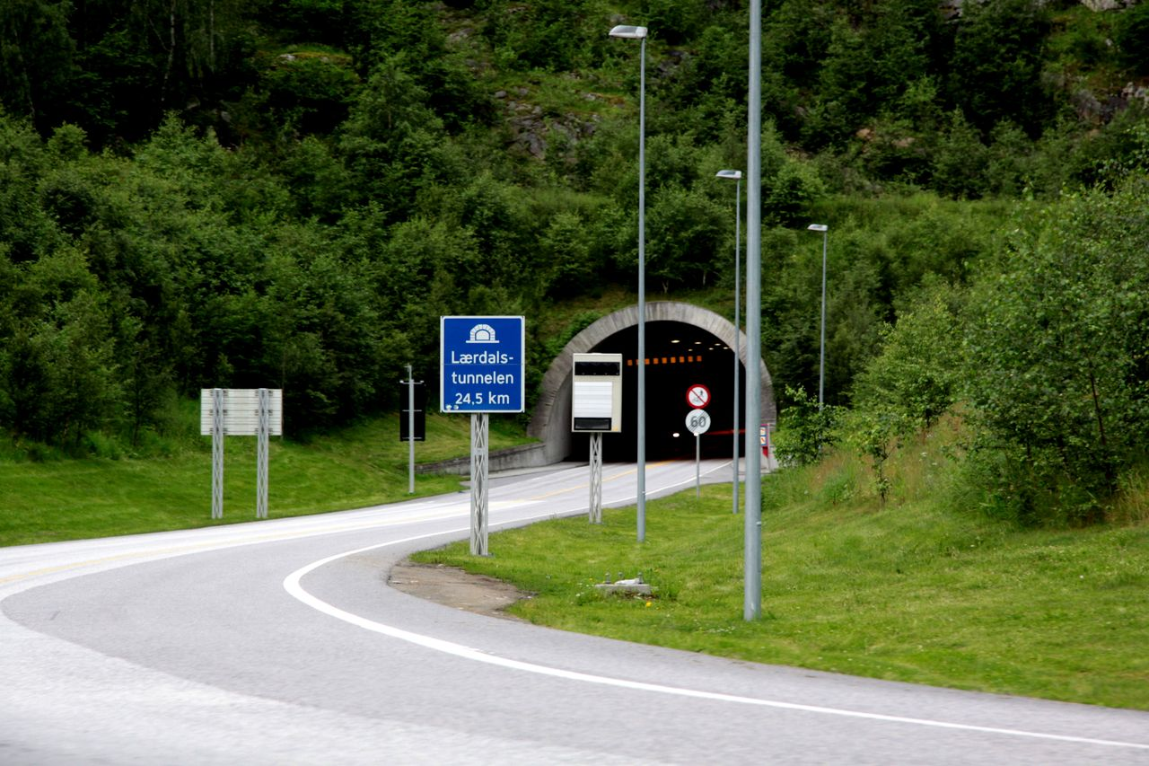 24,5 km ..tunel